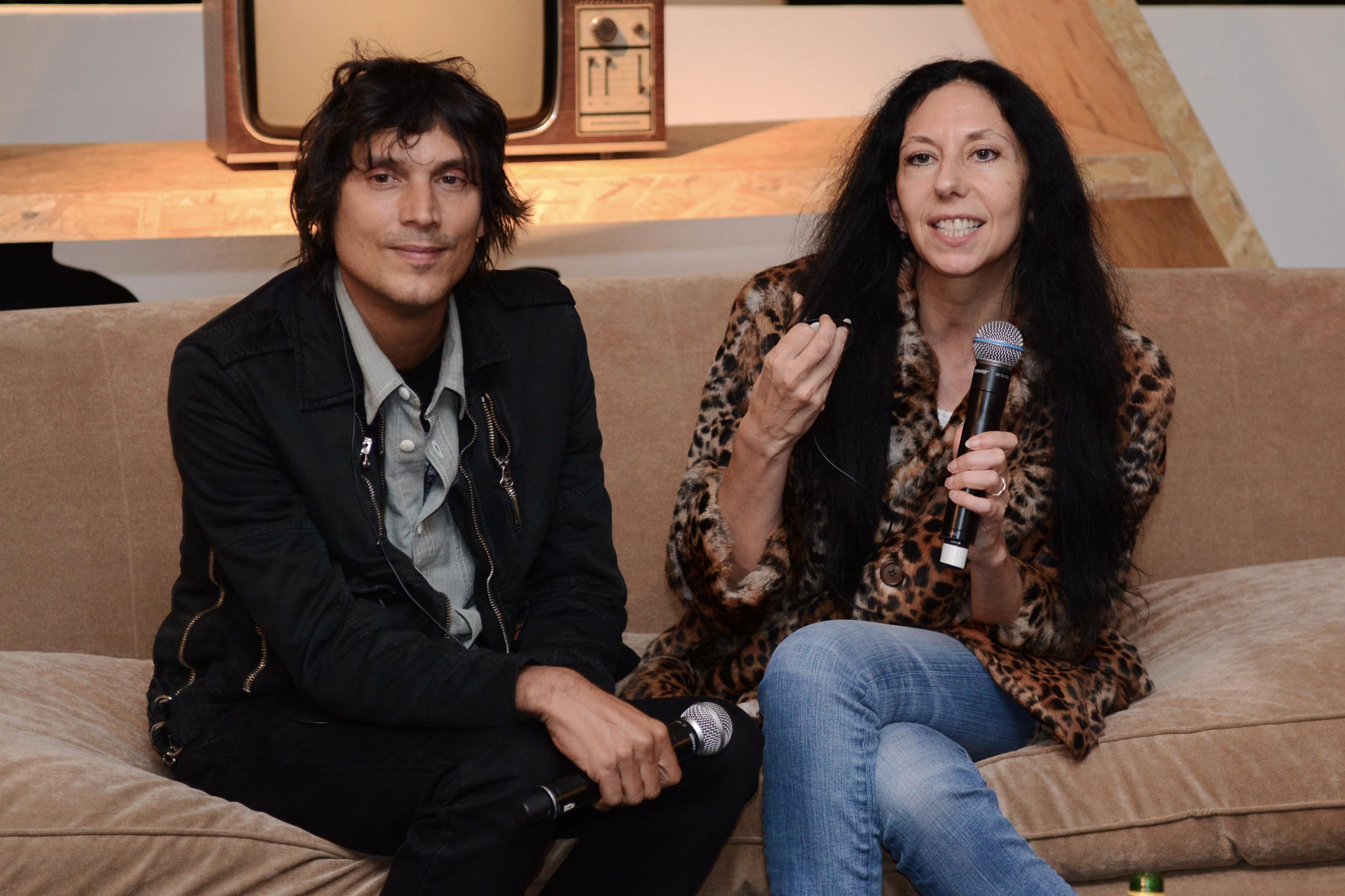 Foto: Marcos Madi